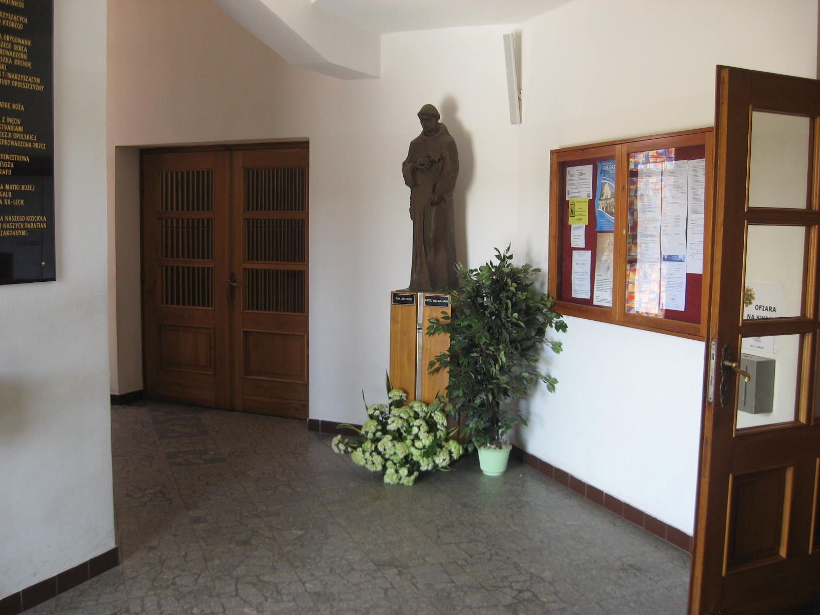 Przedsionek po lewej stronie